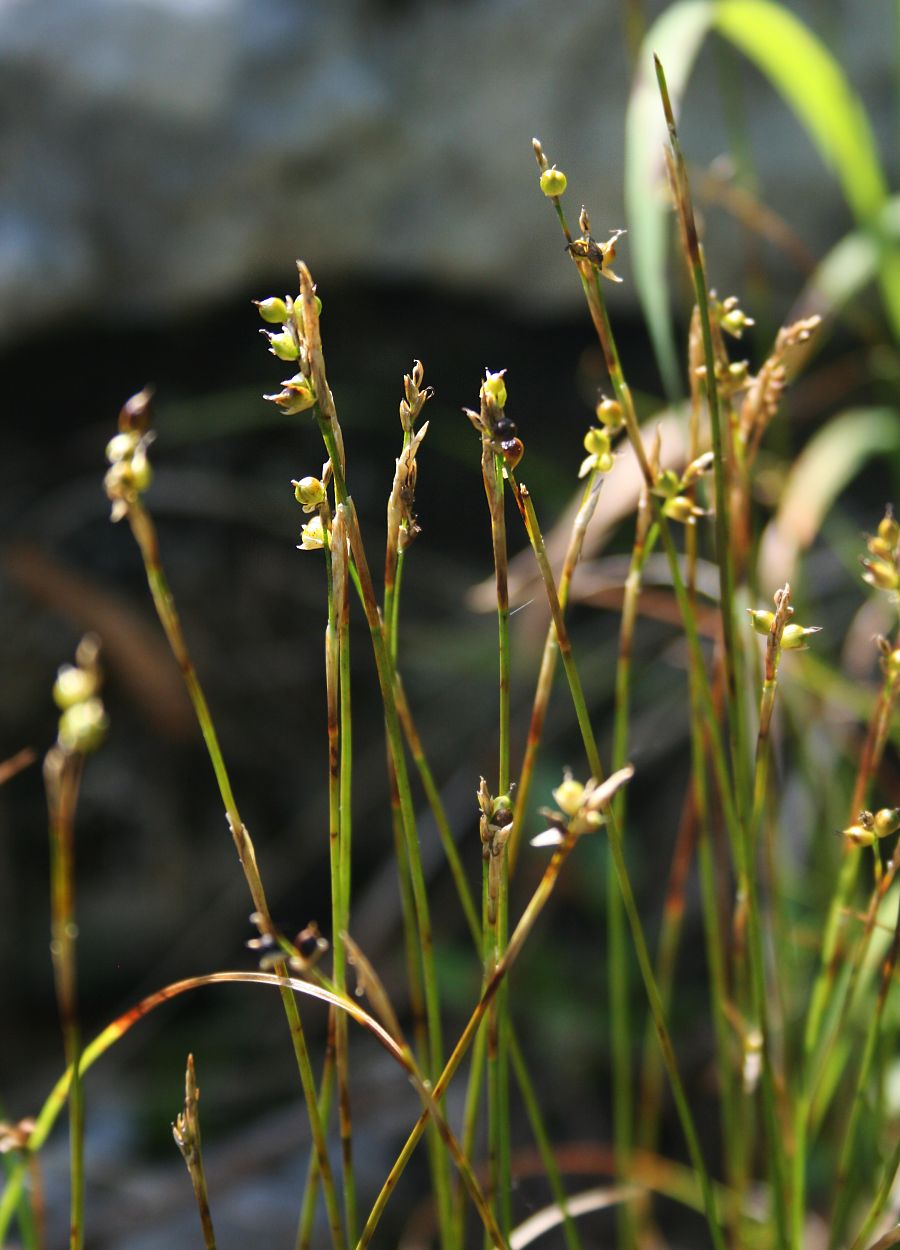 Weiß-Segge (Carex alba), Sauergräser (Cyperaceae) – Österreich/Austria/Autriche: Oberösterreich, Salzkammergut, Mitterweißenbachtal N Bad Ischl